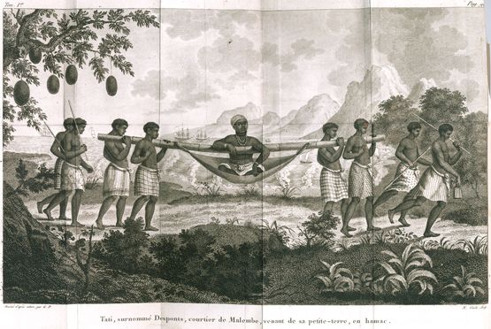 Le courtier Tati dit "Desponts" transporté en "tipoye" par ses employés. Tiré de "Voyage à la côte occidentale d'Afrique" du négrier Louis Ohier de Granpré (1801)